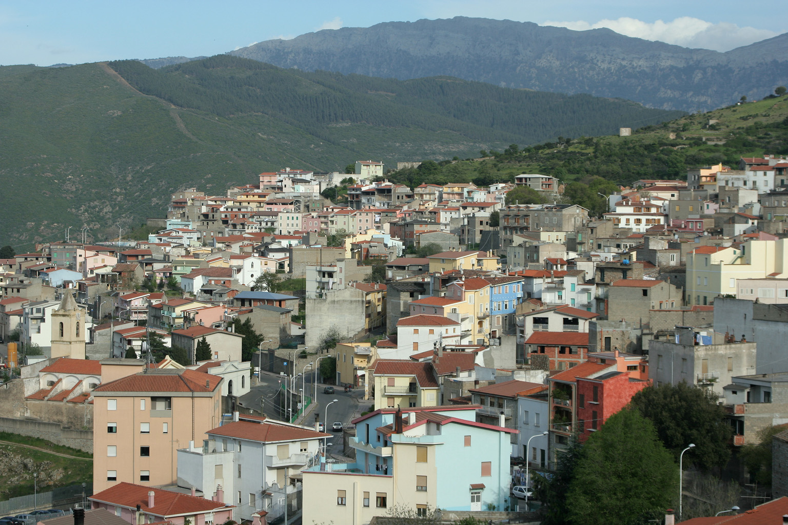 Orgosolo ist ein Dorf im Zentrum Sardiniens